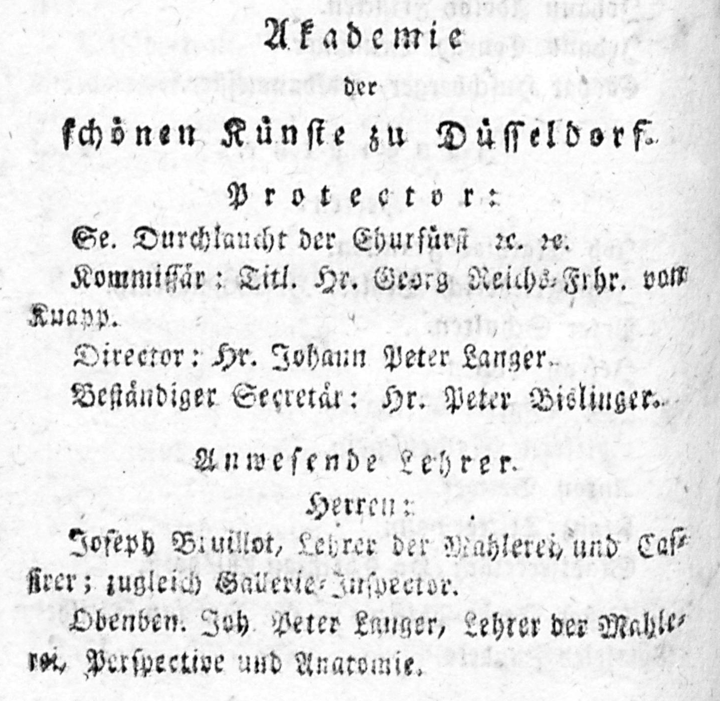 Akademie der schönen Künste zu Düsseldorf, 1801 in Jahrbuch der Armen-Versorgungsanstalt und Adressbuch von Düsseldorf, S. 54